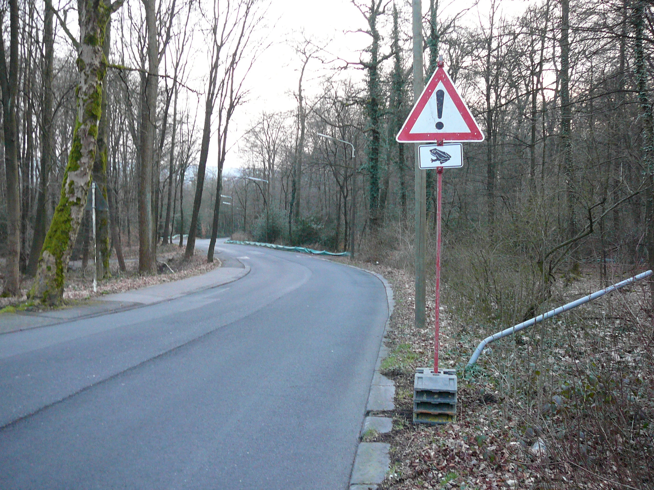 Vogelsangstraße, Wuppertal-Elberfeld